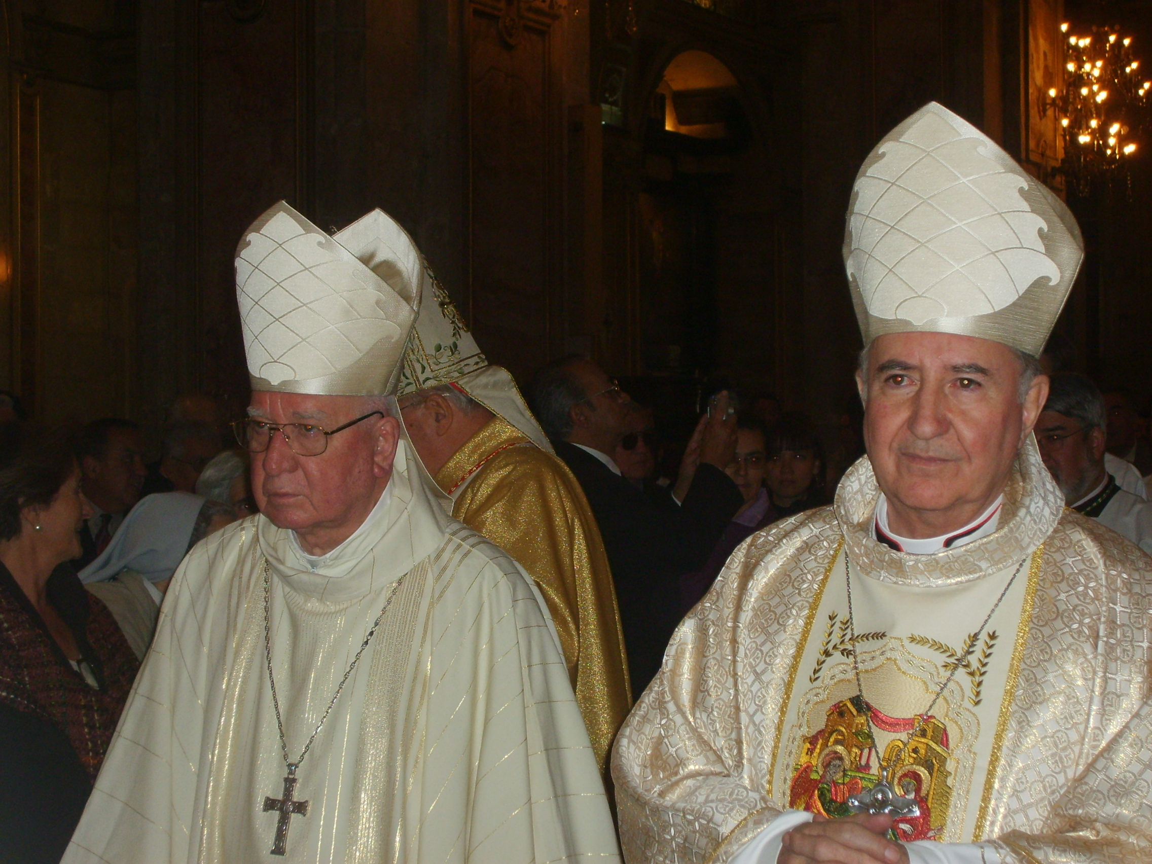 Fotografía de los cardenales Jorge Medina y Francisco Javier Errázuriz durante una celebración en la Catedral Metropolitana de Santiago